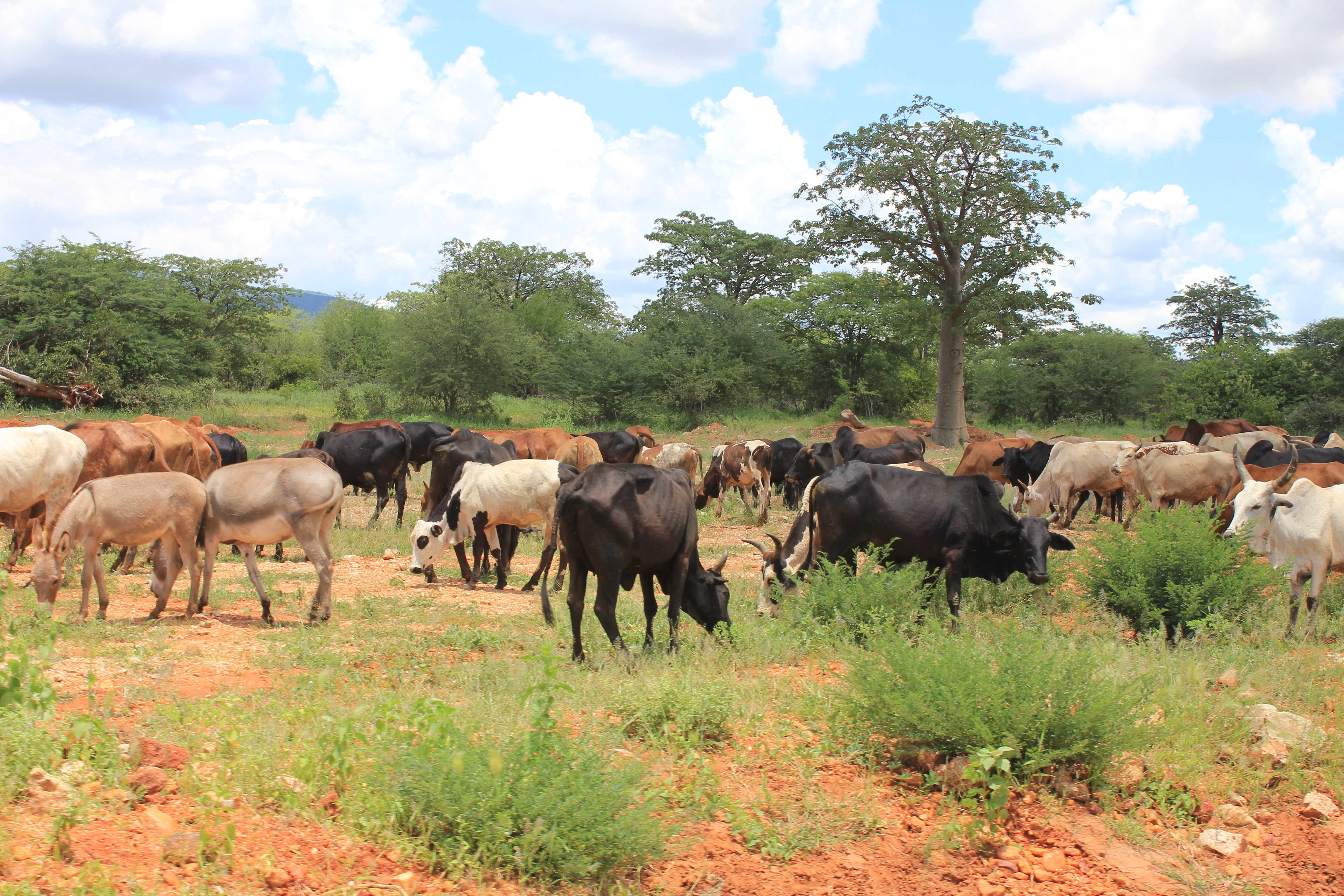 Dodoma, Tanzania